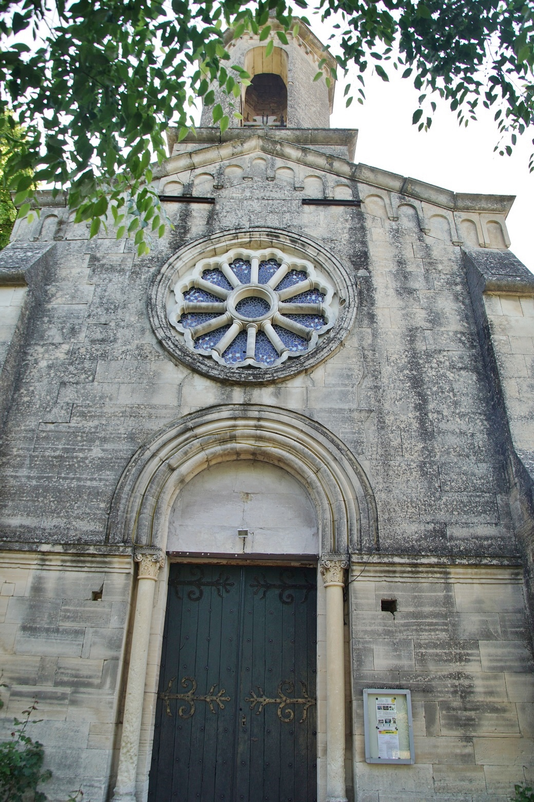 église Sainte Anne